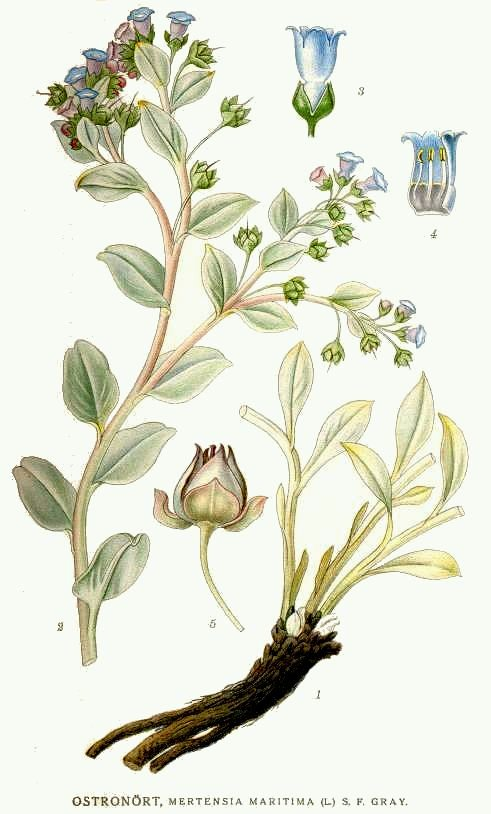 Original Description Ostronört, Mertensia maritima (L.) S.F.Gray